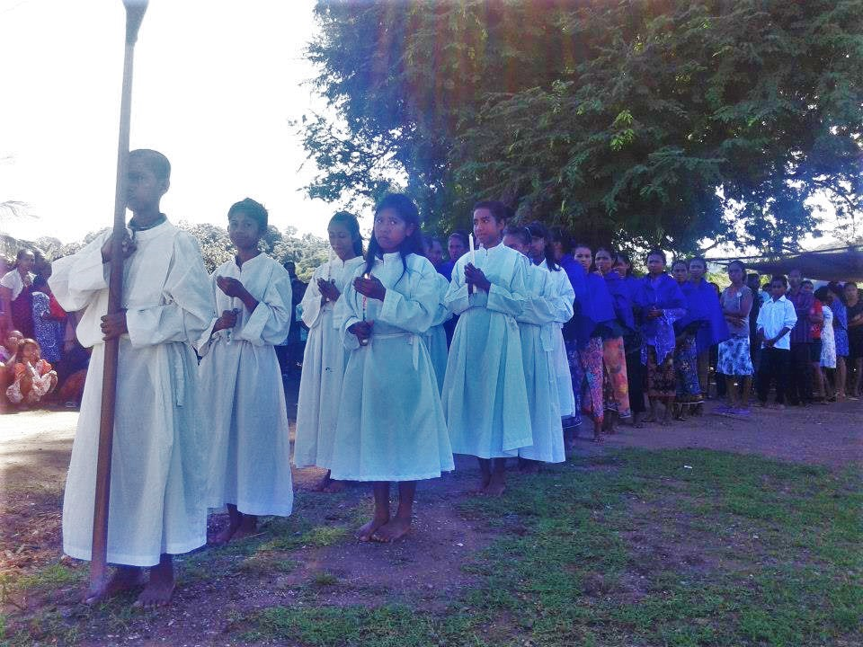 Atabae